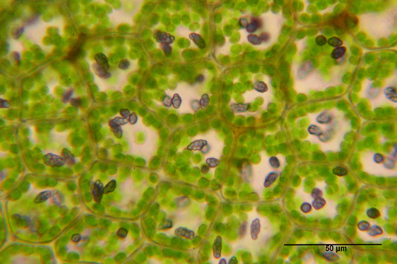 Blaues Bartkelchmoos (Calypogeia azurea) Mikroskopaufnahme: Flankenblattzellen mit blauen Ölkörpern